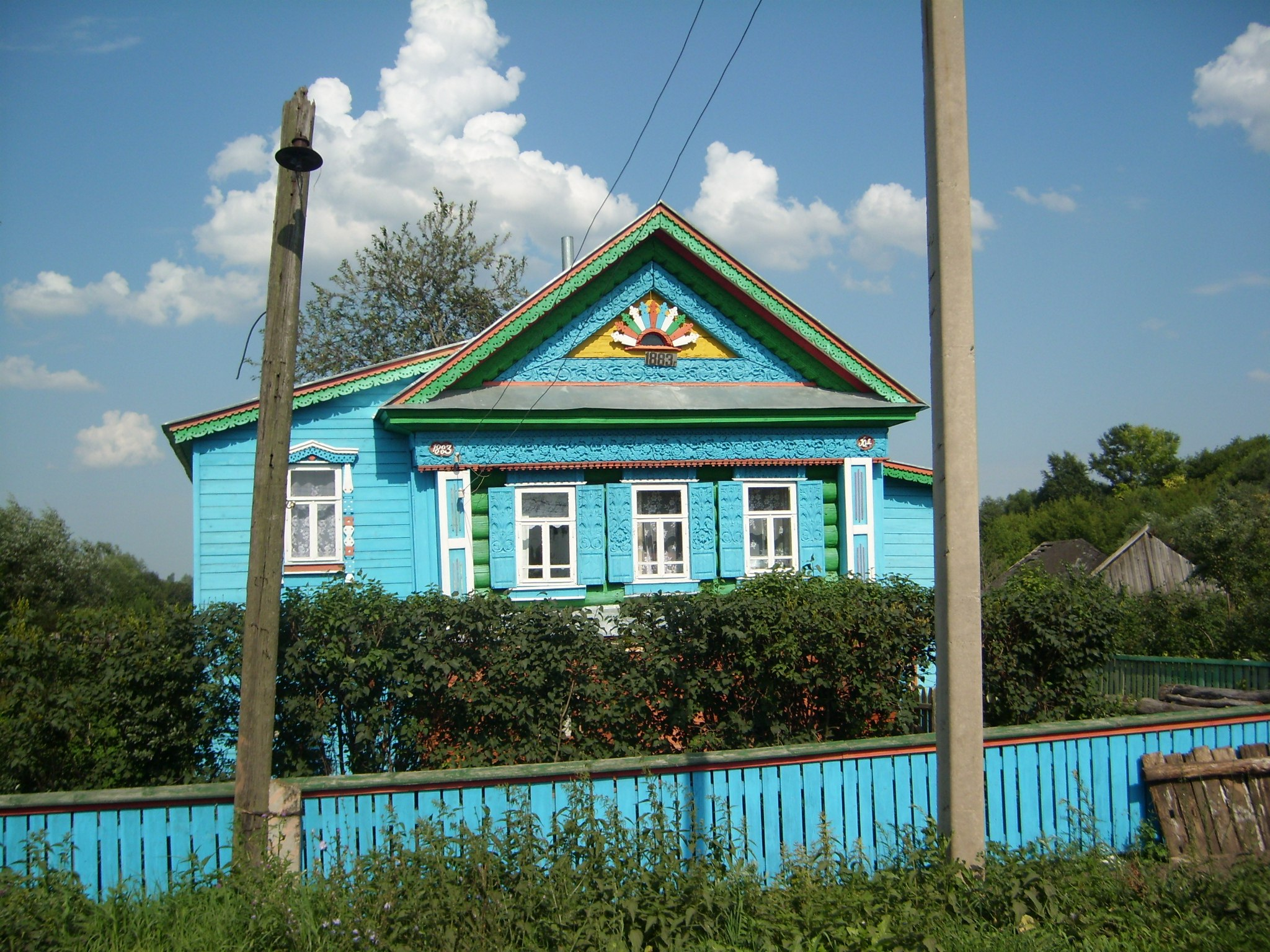 Татарское Маклаково, дом 19 века